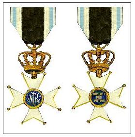 Eigen scan van een kruis in mijn verzameling, bewerkt met paint en een getekend lint.